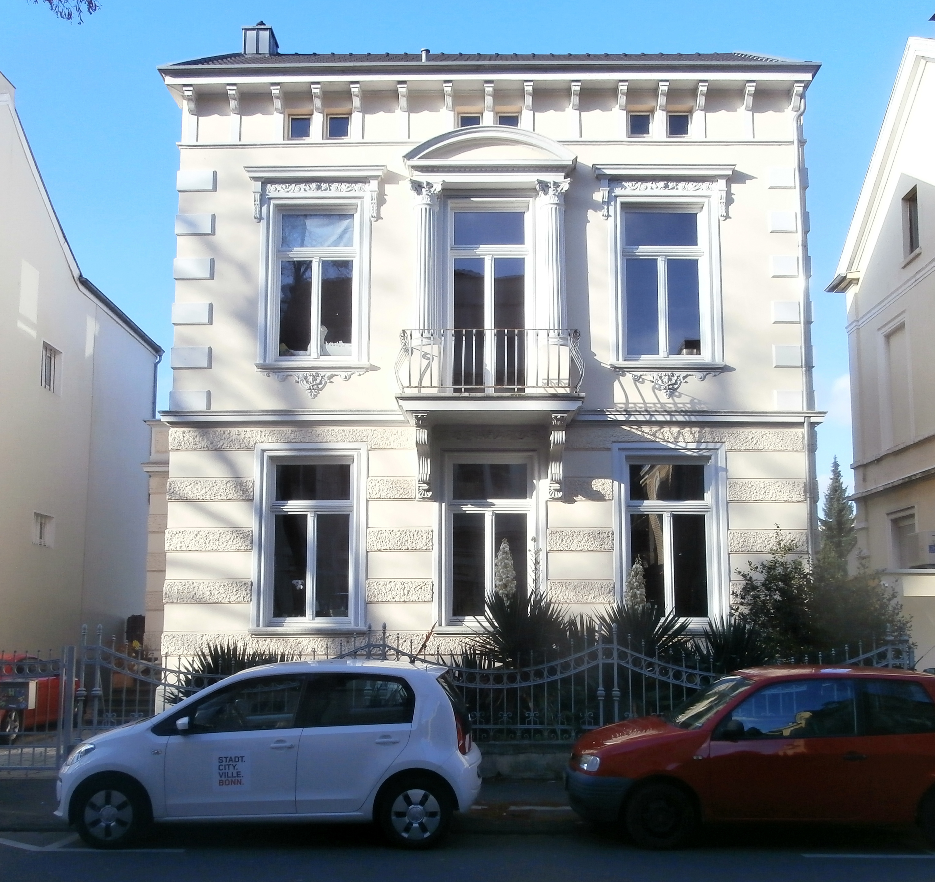 Denkmalgeschütztes Wohngebäude, Beethovenallee 13, Bonn-Godesberg-Villenviertel